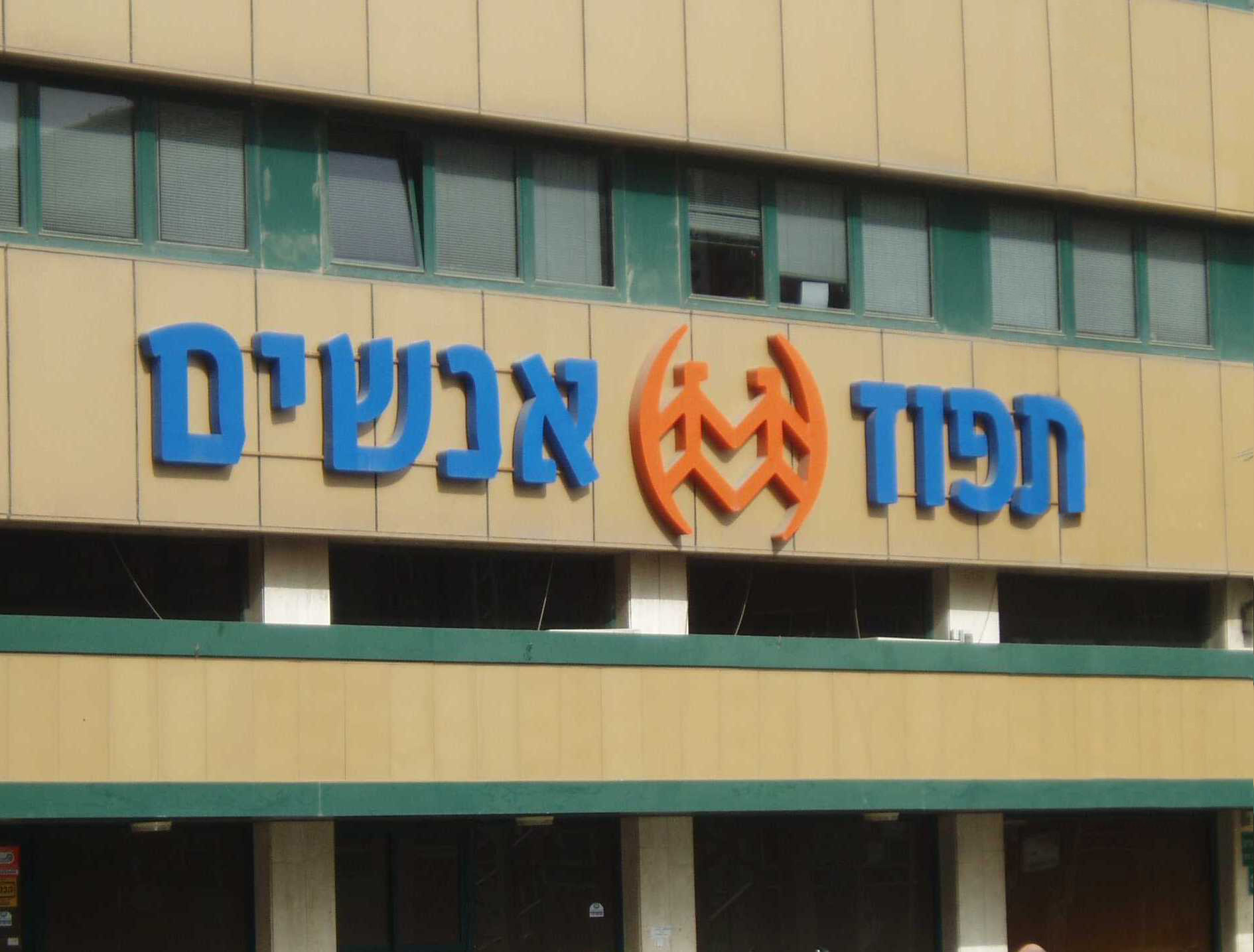 Well at Yarda (inside view)